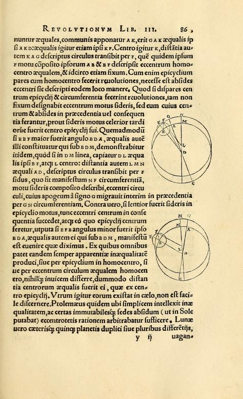 コペルニクス『天球の回転』より、惑星軌道の解説。